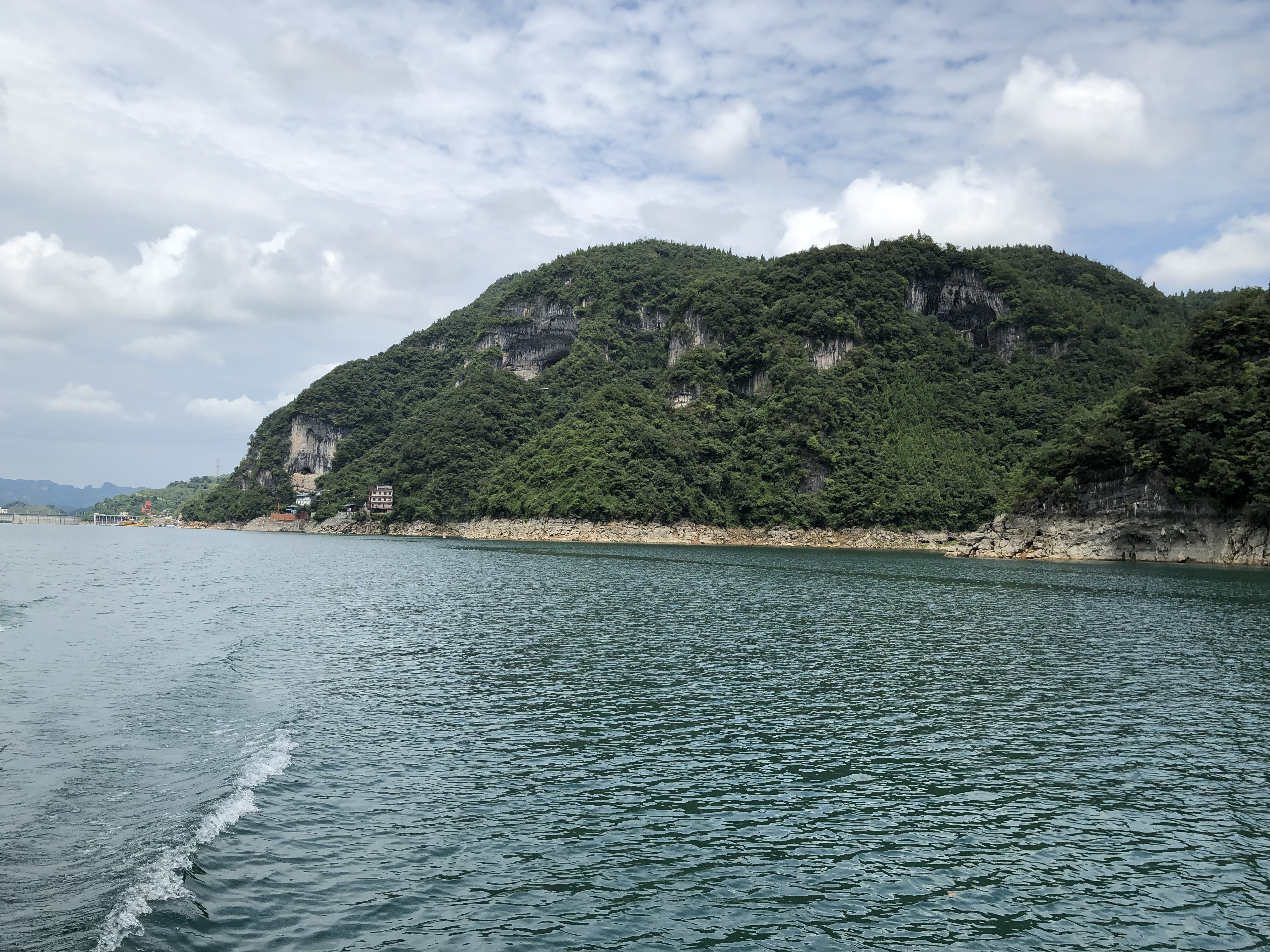 中文（中国大陆）: 清江画廊——国家AAAAA级景区